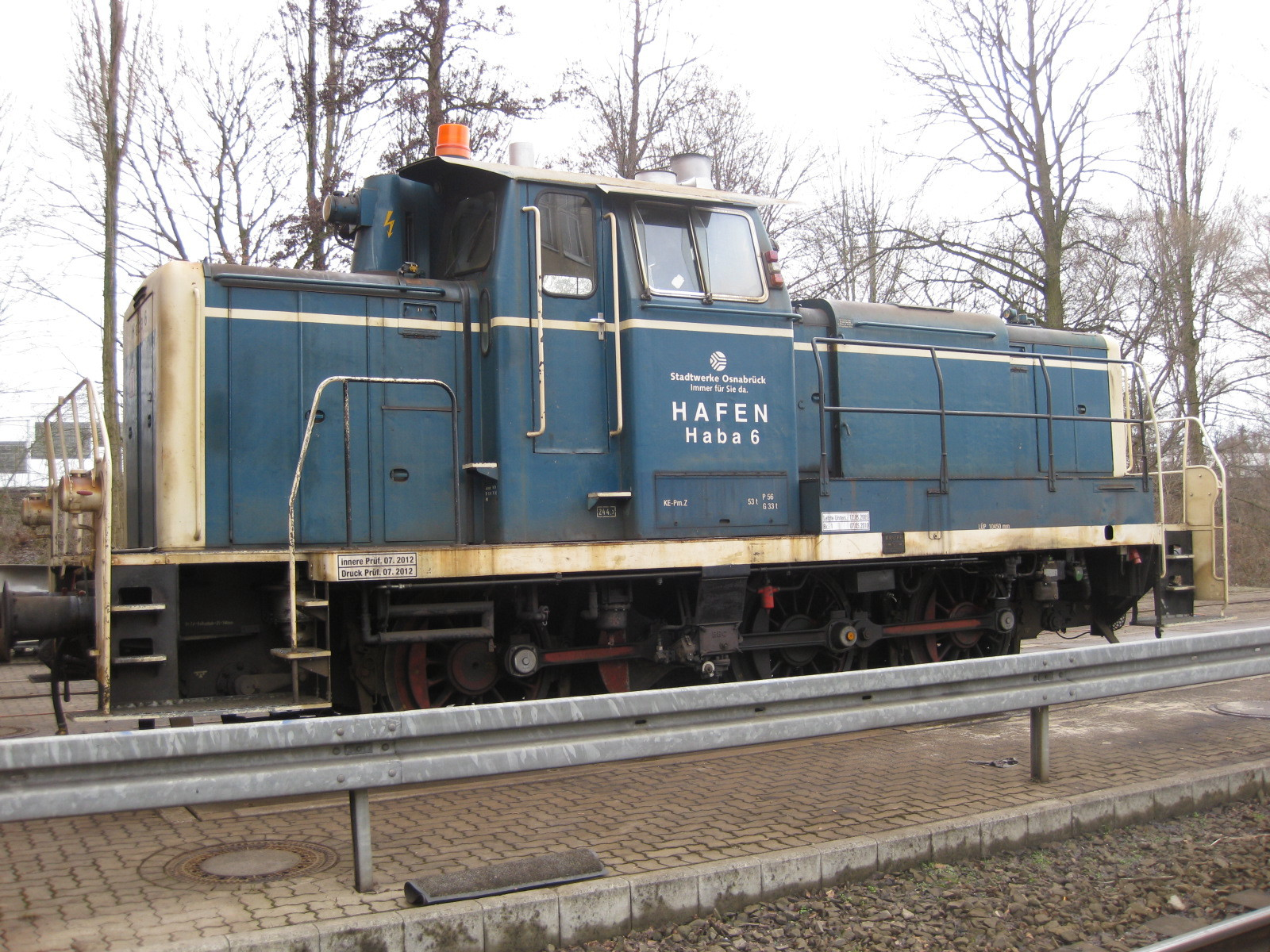 Lok 6 der Hafenbahn der Stadtwerke Osnabrück im Stadtteil Osnabrück-Hafen, Stadt Osnabrück.